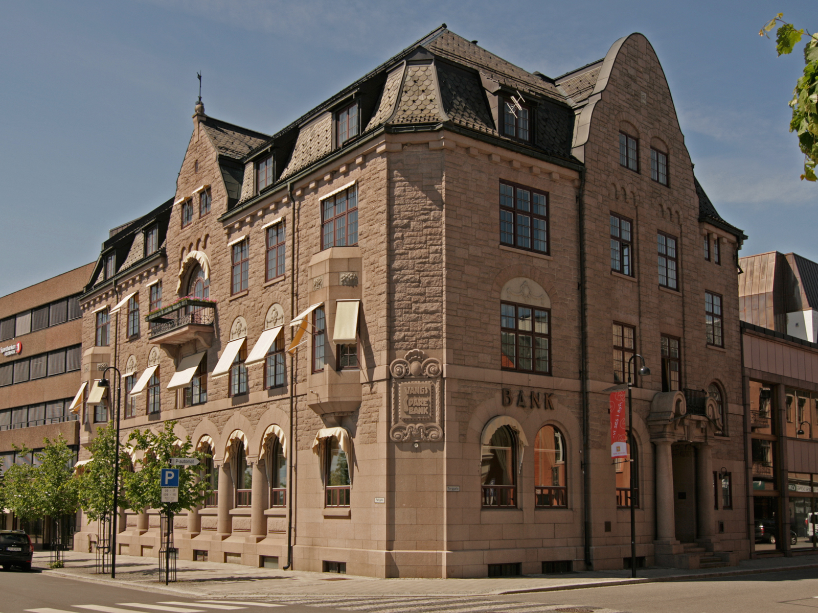 Vangs Sparebank (Sparebanken Hedmark), Torggata 12, Hamar, Hamar. Bygd 1918. Arkitekter: Ove Ekman, Einar Smith og Carl Michalsen.